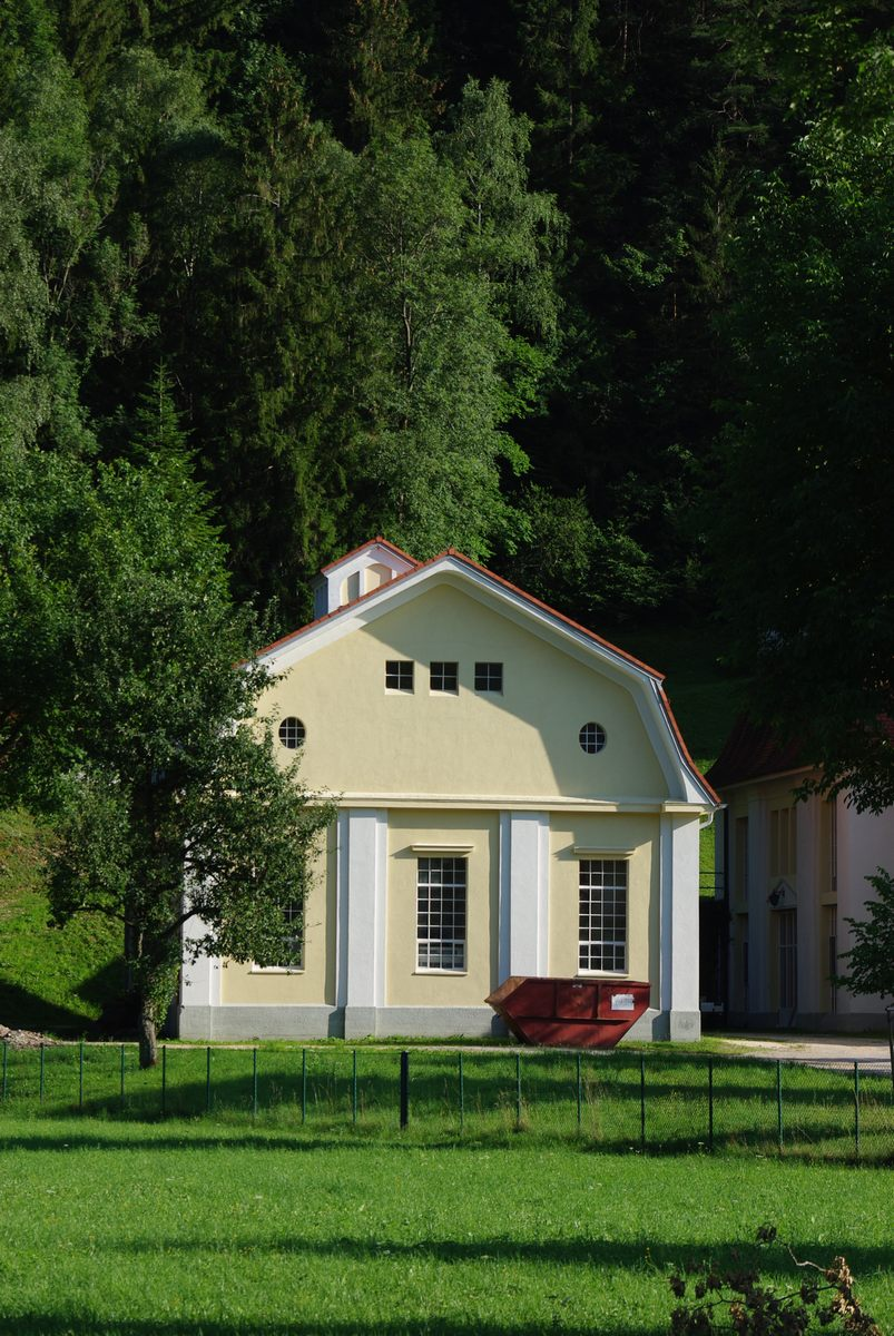 Saalachkraftwerk in 83435 Bad Reichenhall, "Wackerhaus"